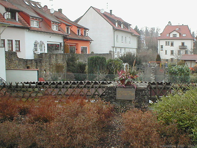 Gedenkstein an der Stelle der früheren Synagoge in Neckarbischofsheim. Im Hintergrund sind Reste der teils überbauten Stadtmauer zu sehen.